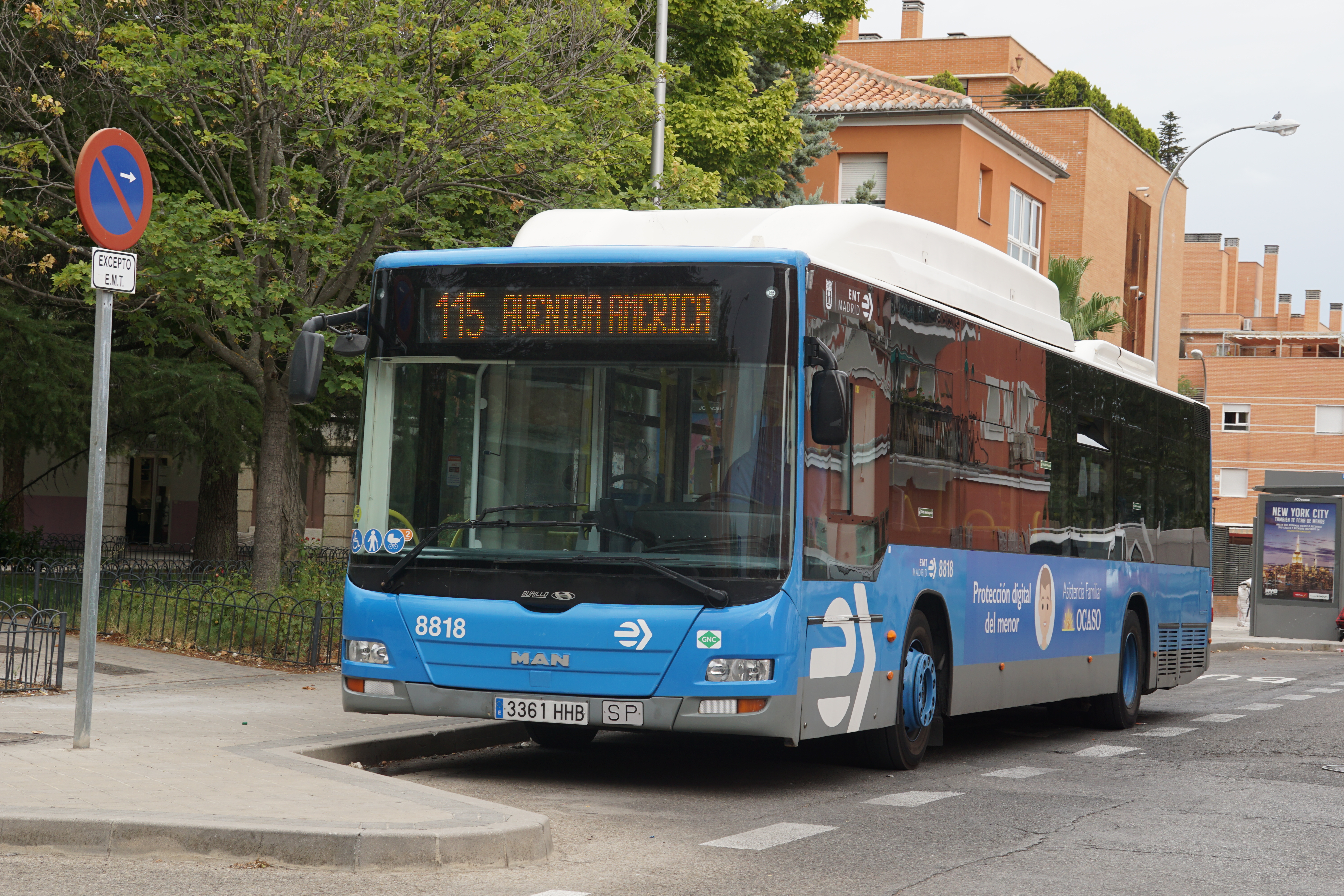 Línea 115 de la EMT de Madrid en el final de la Pl.Virgen de Loreto